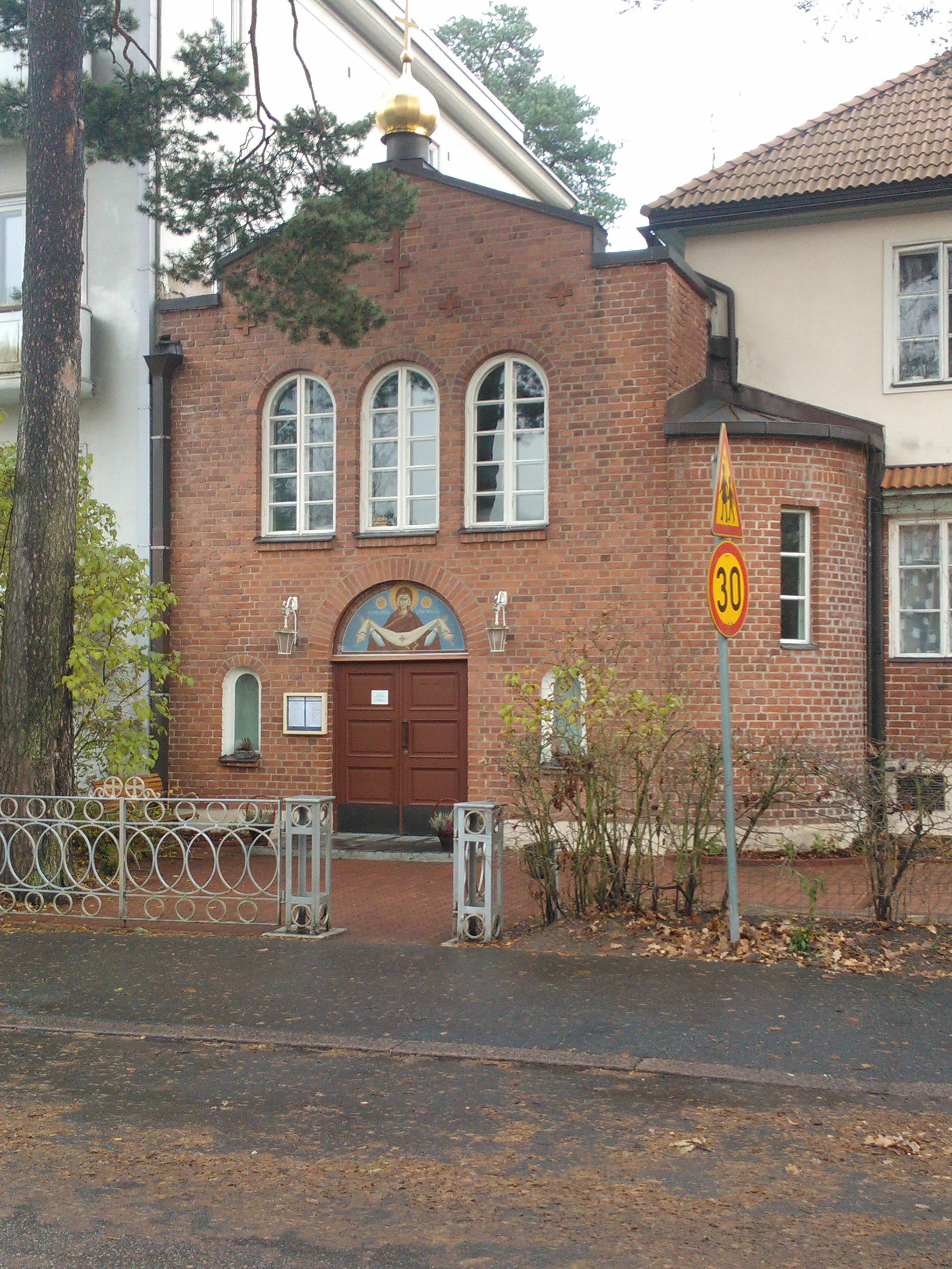 Покровский русский храм в Хельсинки